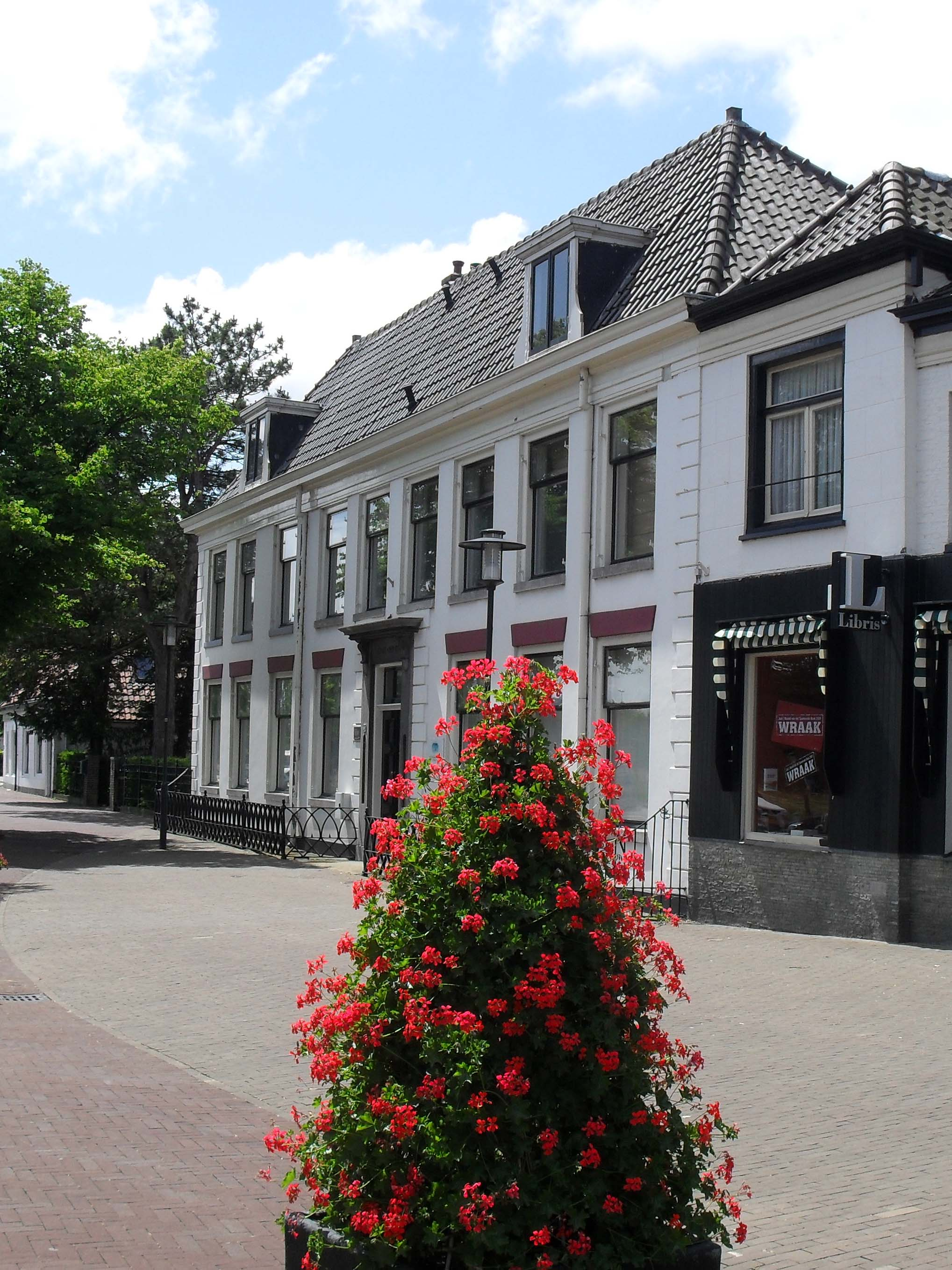 Vluchthoven, Hoofdstraat 236 te Santpoort Noord.